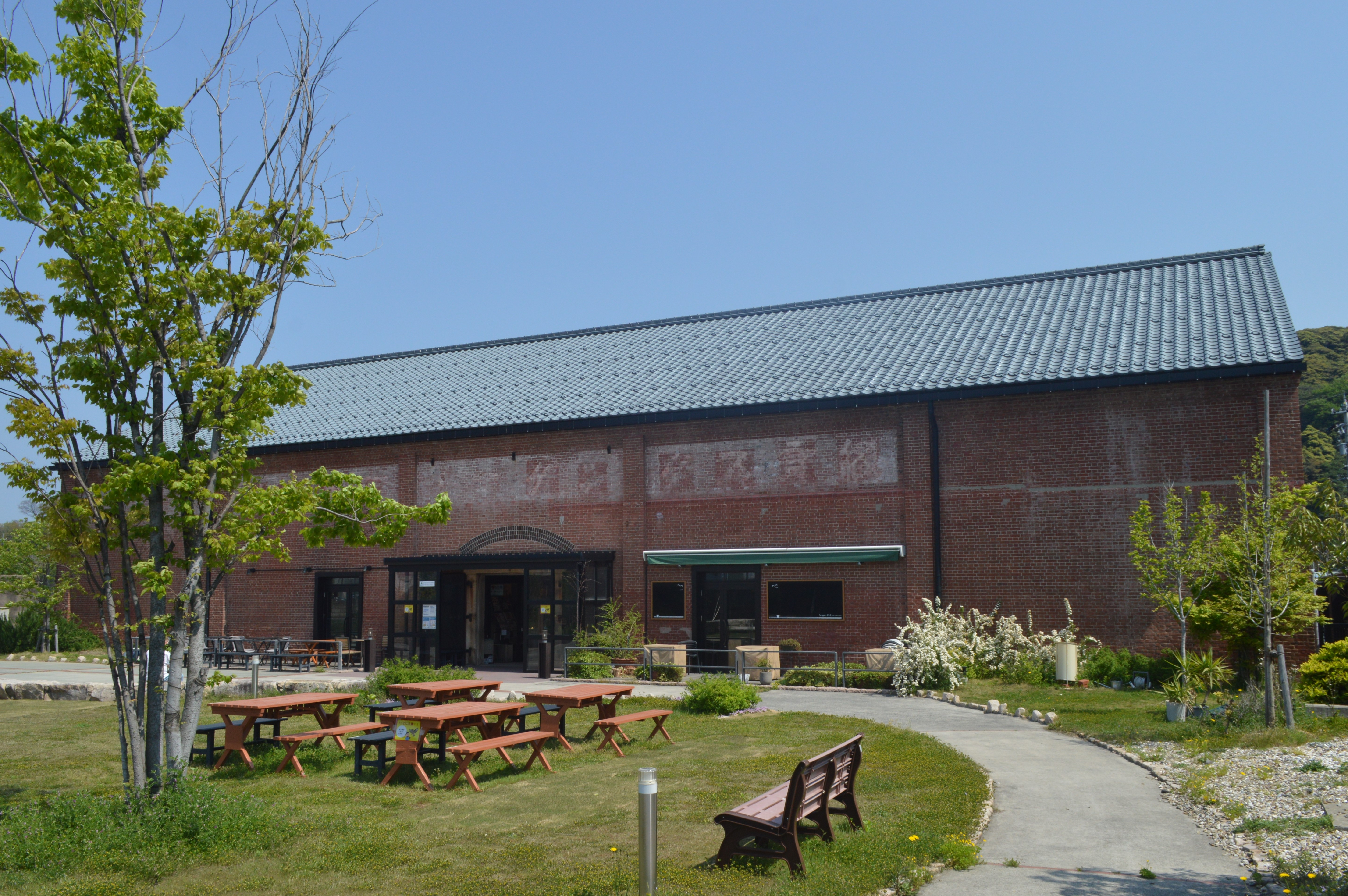 福井県敦賀市金ケ崎町4-1にある敦賀赤レンガ倉庫。登録有形文化財。